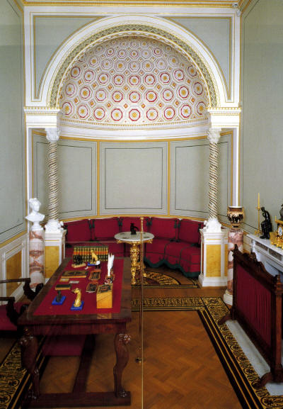 Кабинет императрицы. Царицын павильон